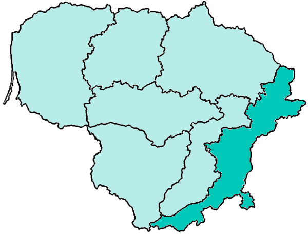 Mappa dell'arcidiocesi cattolica di Vilnius, in Lituania.